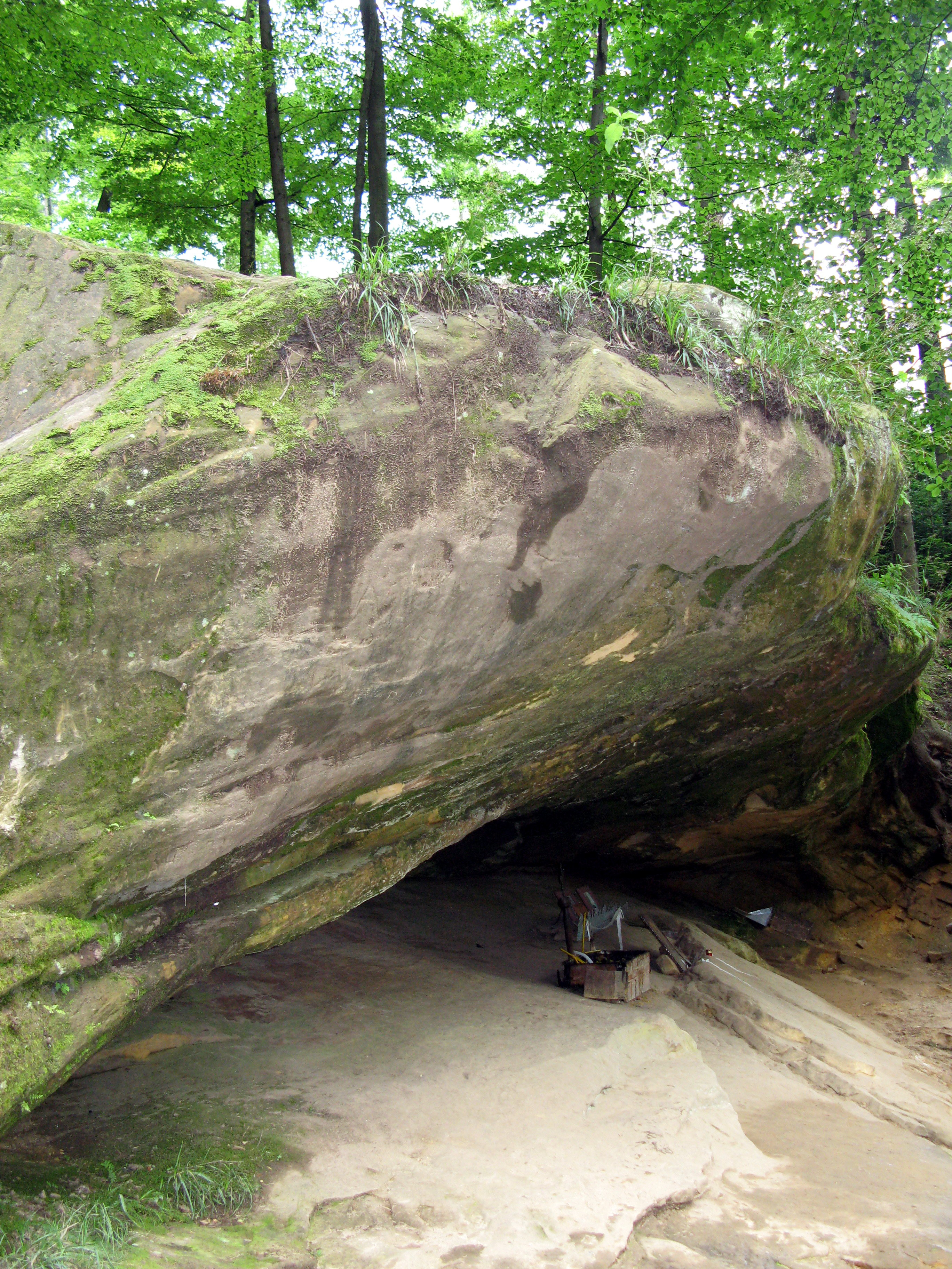 Монастир-скит (мур.):, с. Манява